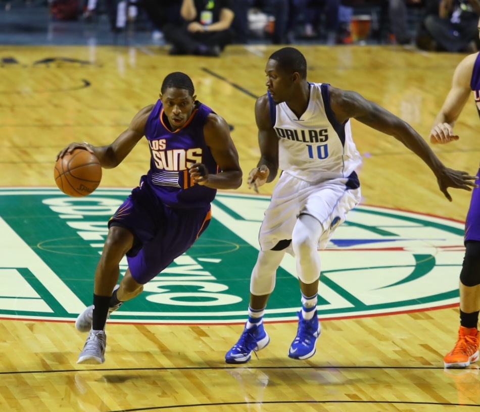 Partido NBA